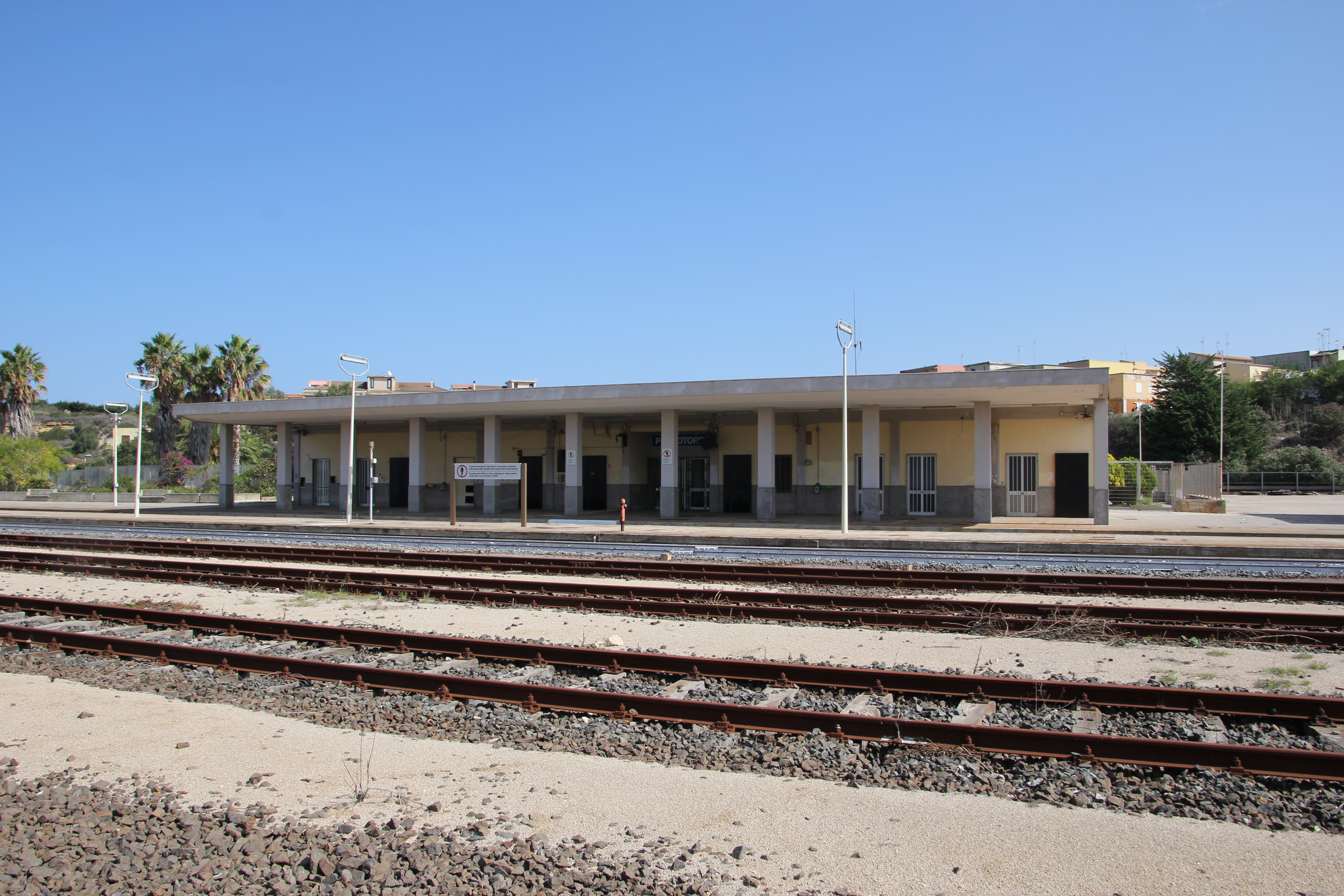 Porto Torres, stazione ferroviaria